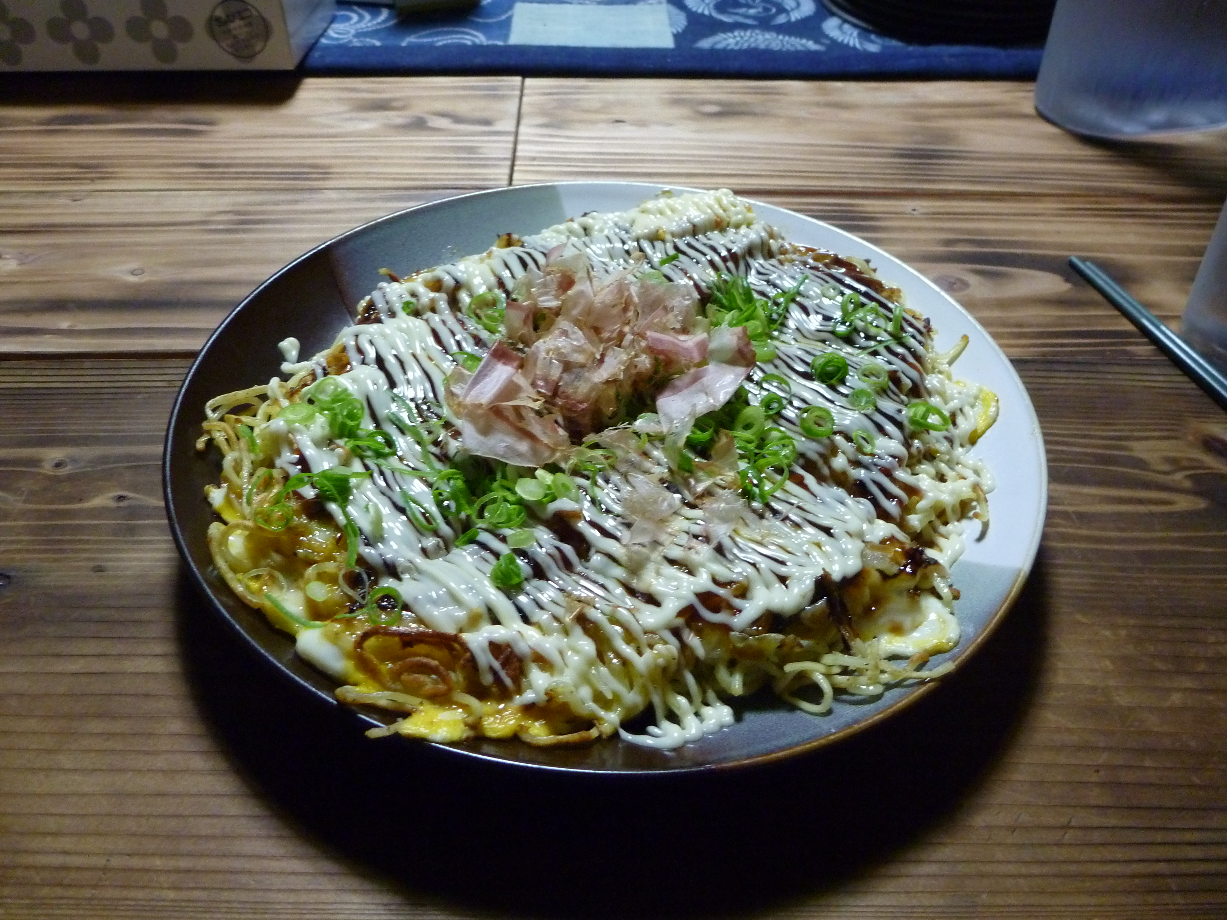 府中焼き 2010年4月 お好み焼き 平の家にて撮影。